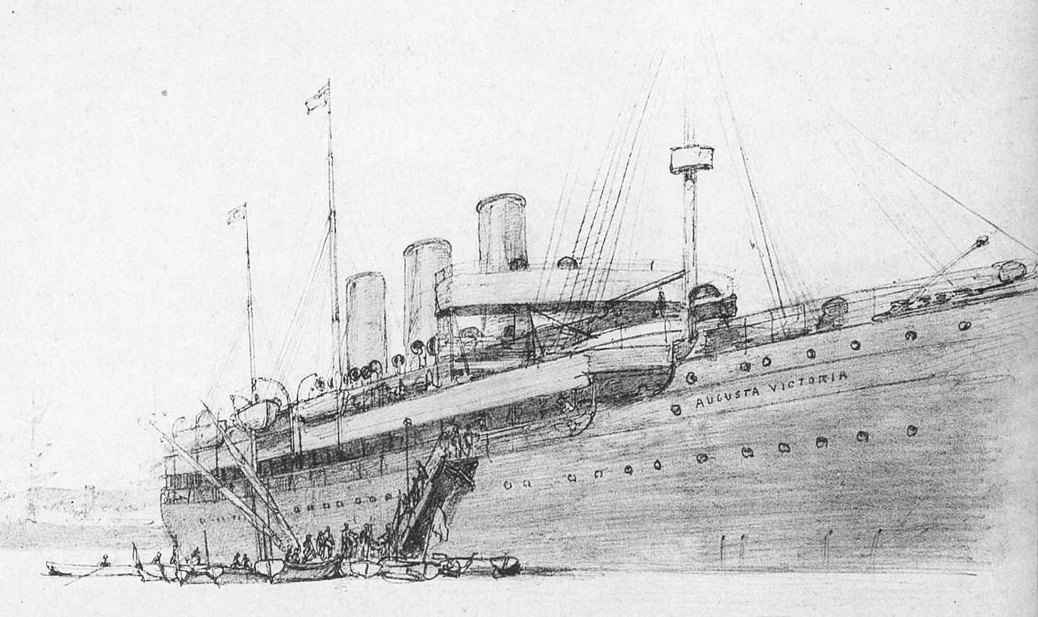 Dampfer "Augusta Victoria" auf Reede vor Piräus